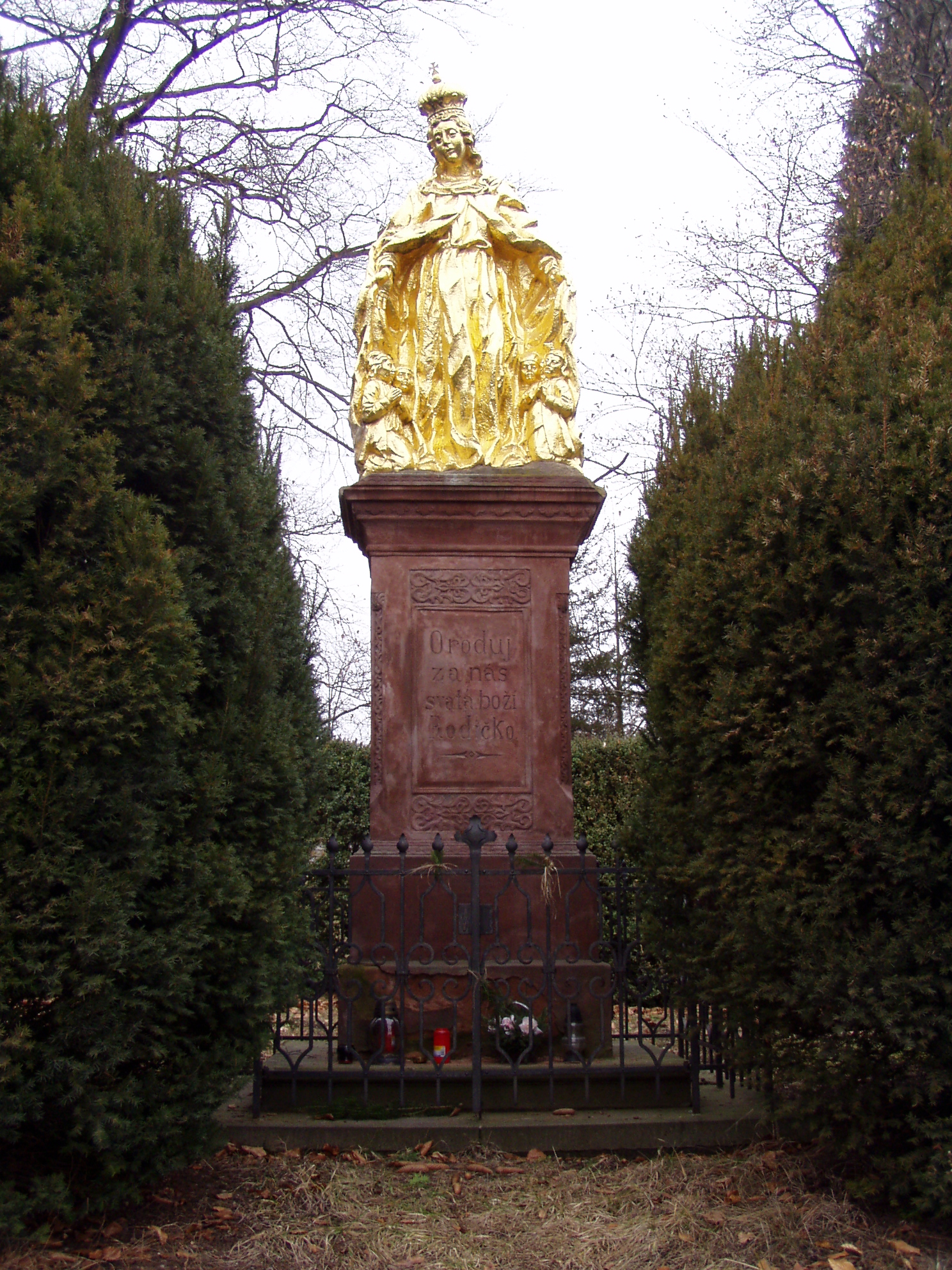 Bohuslavice - socha P. Marie ochranitelky